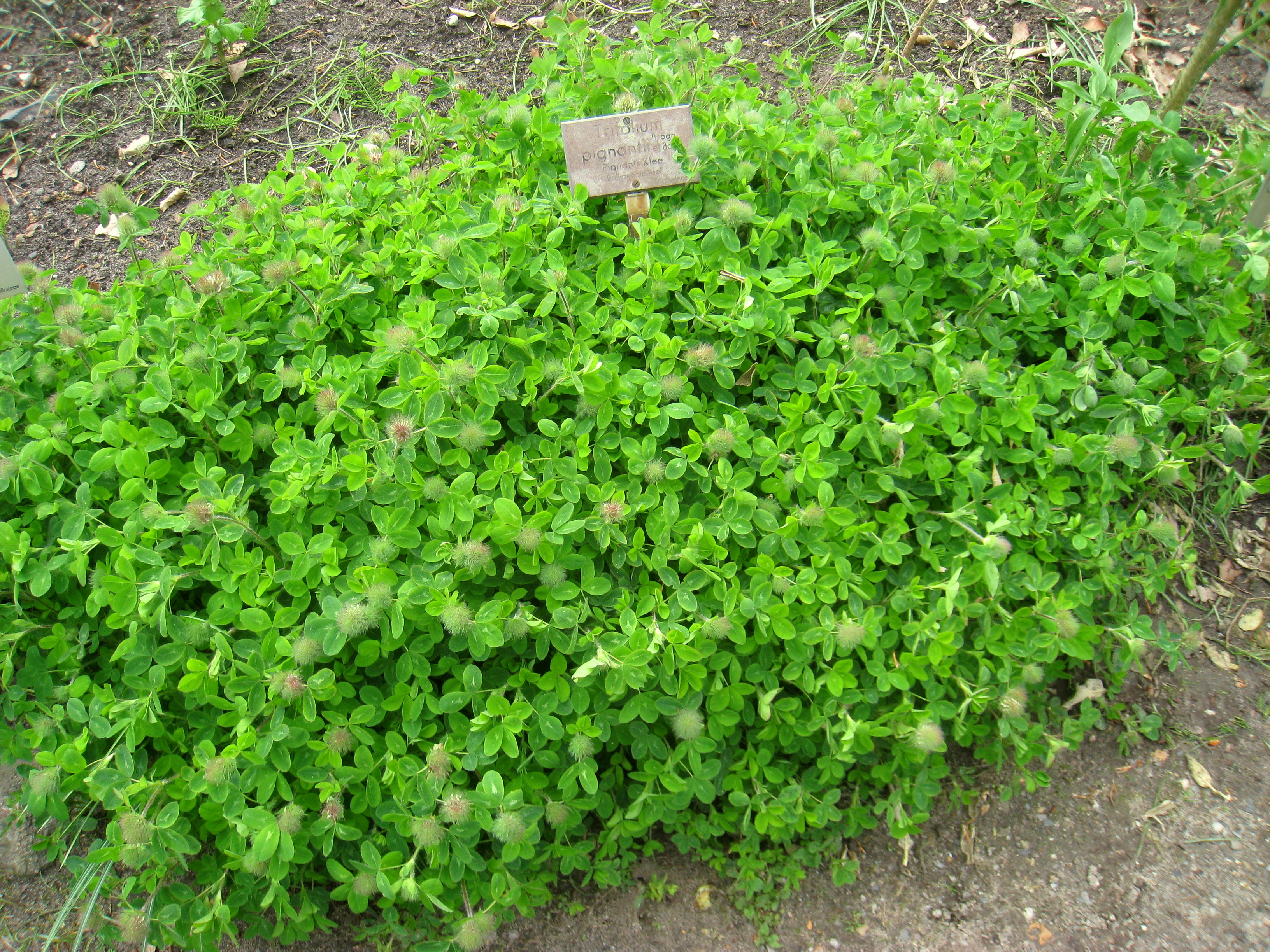 Trifolium pignantii specimen, in the Botanischer Garten, Berlin-Dahlem (Berlin Botanical Garden), Berlin, Germany.